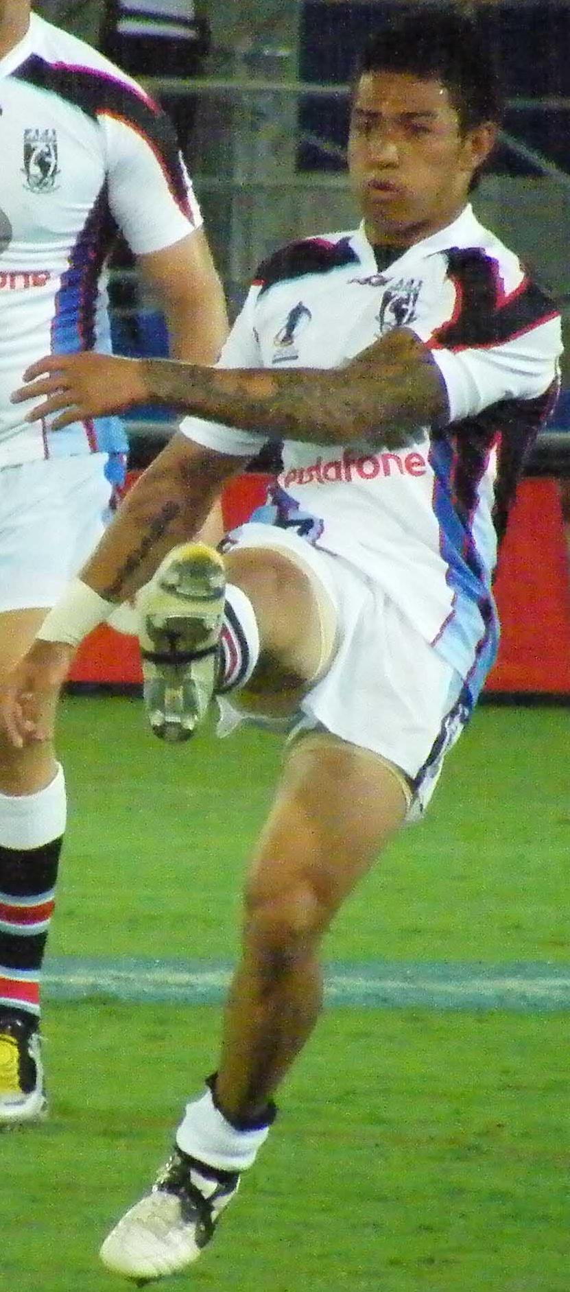 RLWC - Fiji v Ireland, Gold Coast 2008. Fijian half/hooker Aaron Groom.